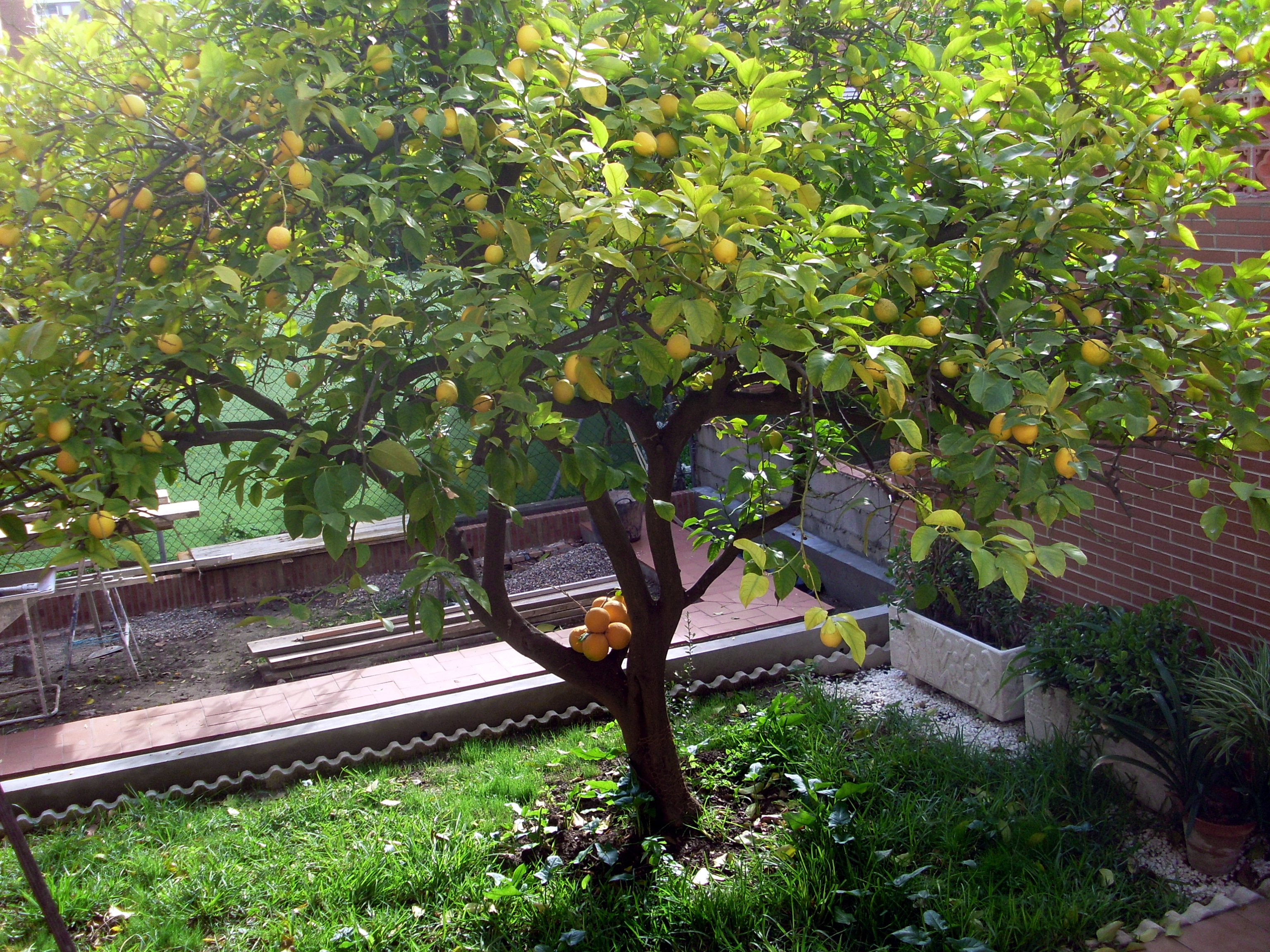 Limonero con injerto de naranjo (los frutos de abajo) , Sevilla, España, noviembre de 2010